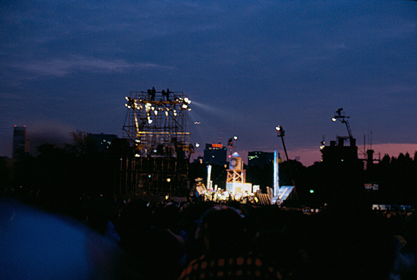 The Concert in Central Park , Paul Simon und Art Garfunkel